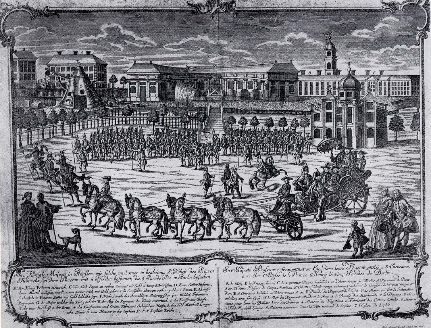 Sommerparade im Lustgarten J.M. Probst Radierung um 1750 im Hintergrund v.l.n.r.: Alte Börse, Neuer Packhof, Turm der Sophienkirche